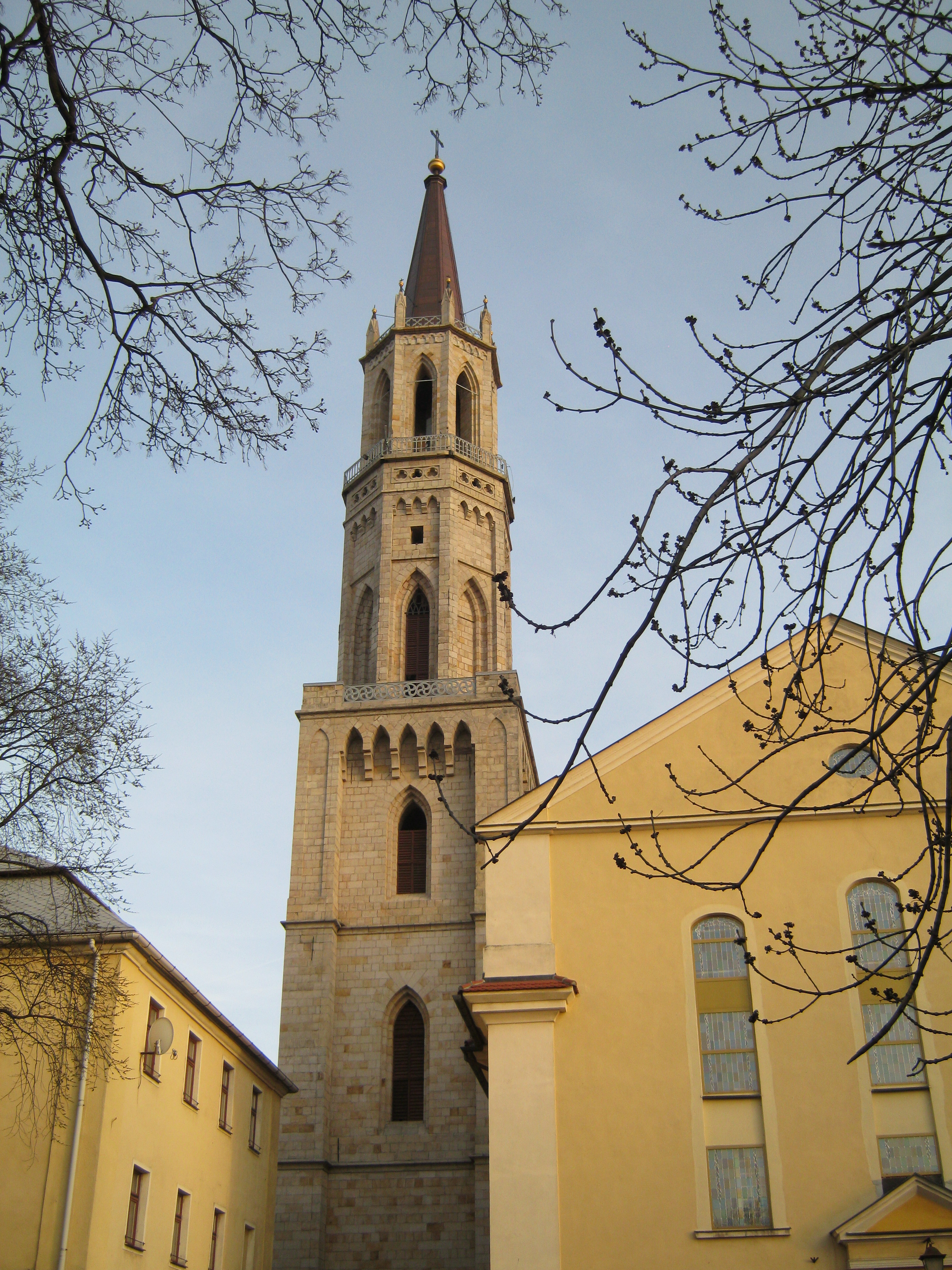 Kościół Matki Bożej Nieustającej Pomocy po renowacji.